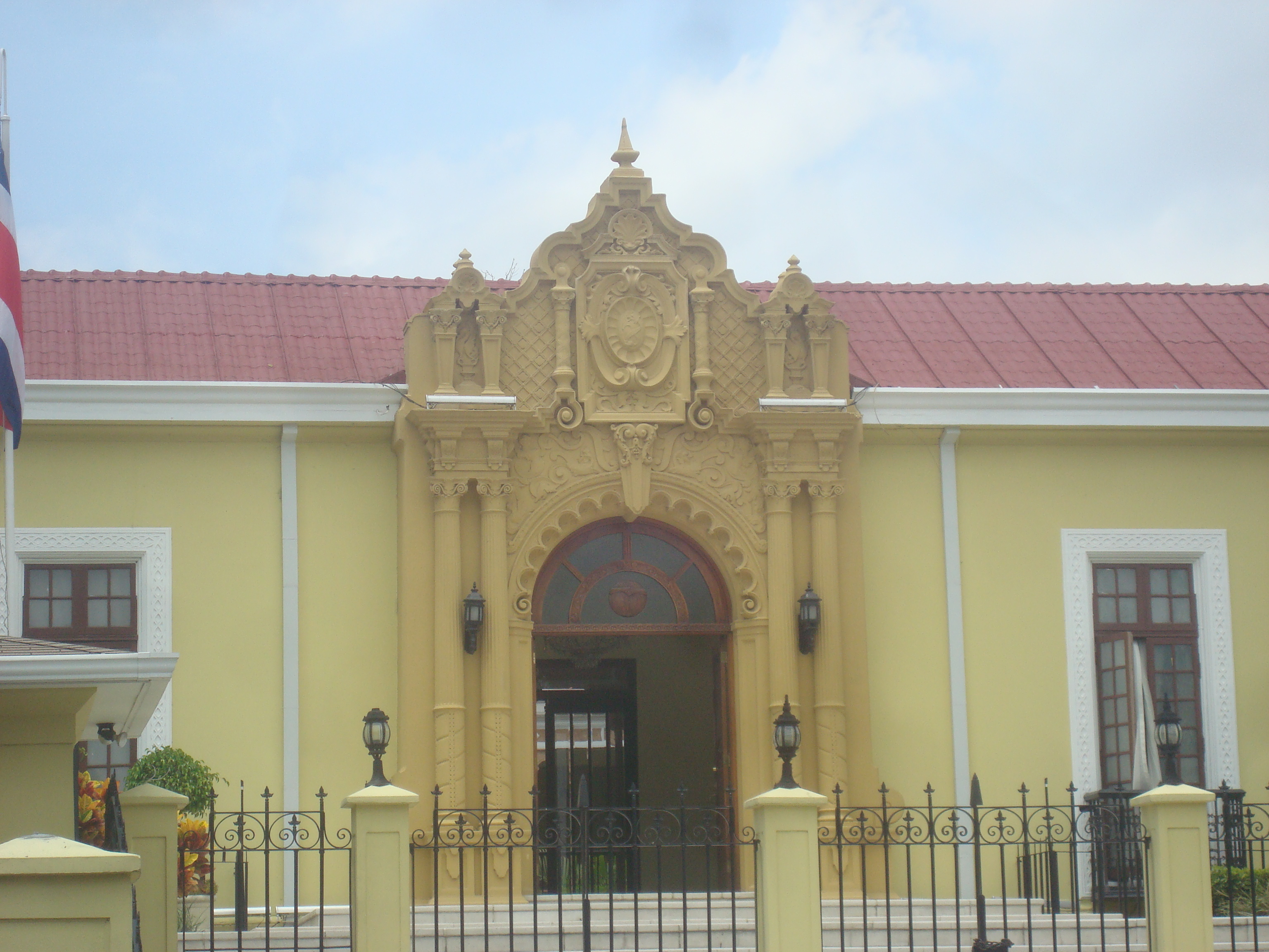 Puerta de la Casa Amarilla, caracterizada por elementos barrocos. San José, Costa Rica.